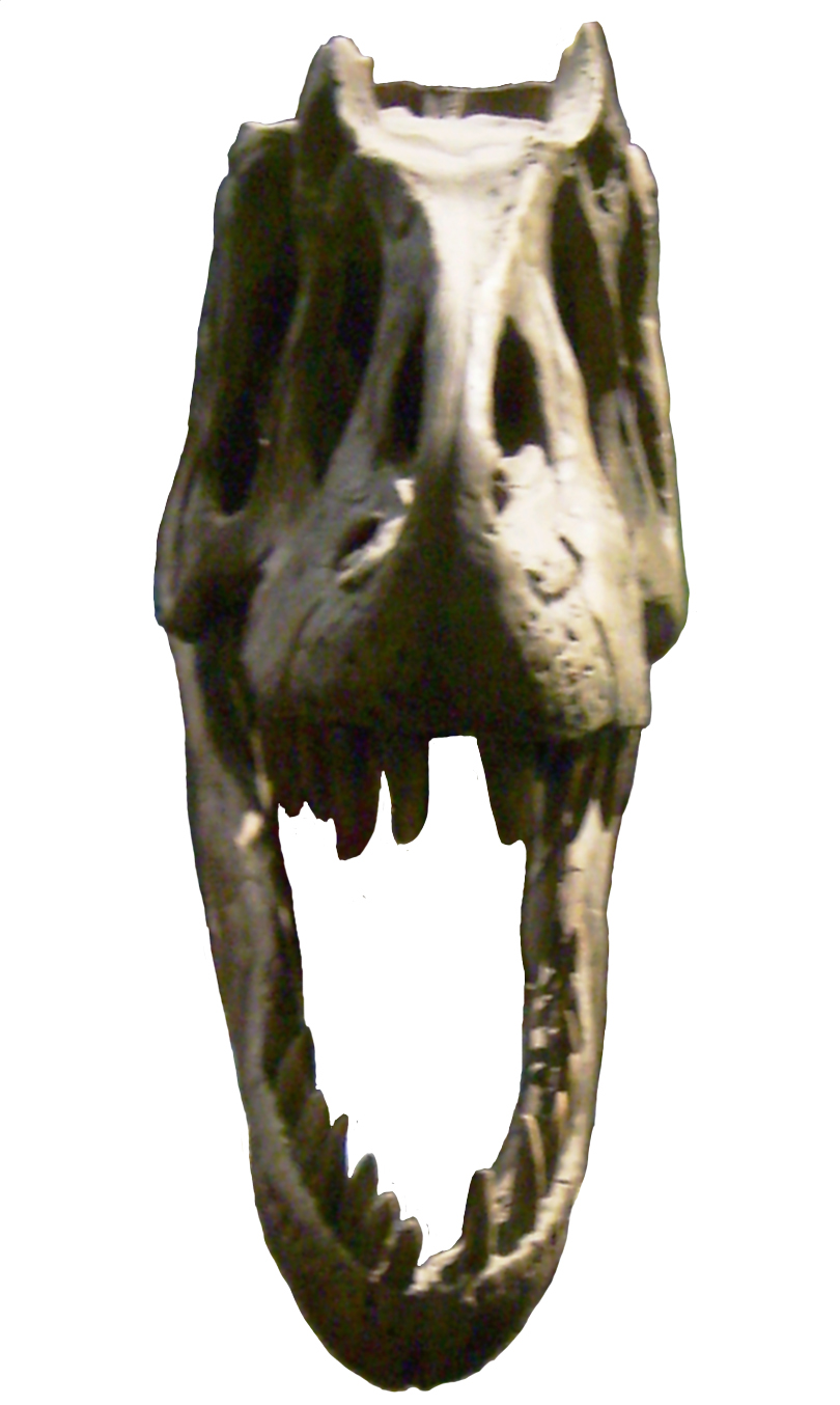 Allosaurus skull cast in front view at the Museum für Naturkunde, Berlin.